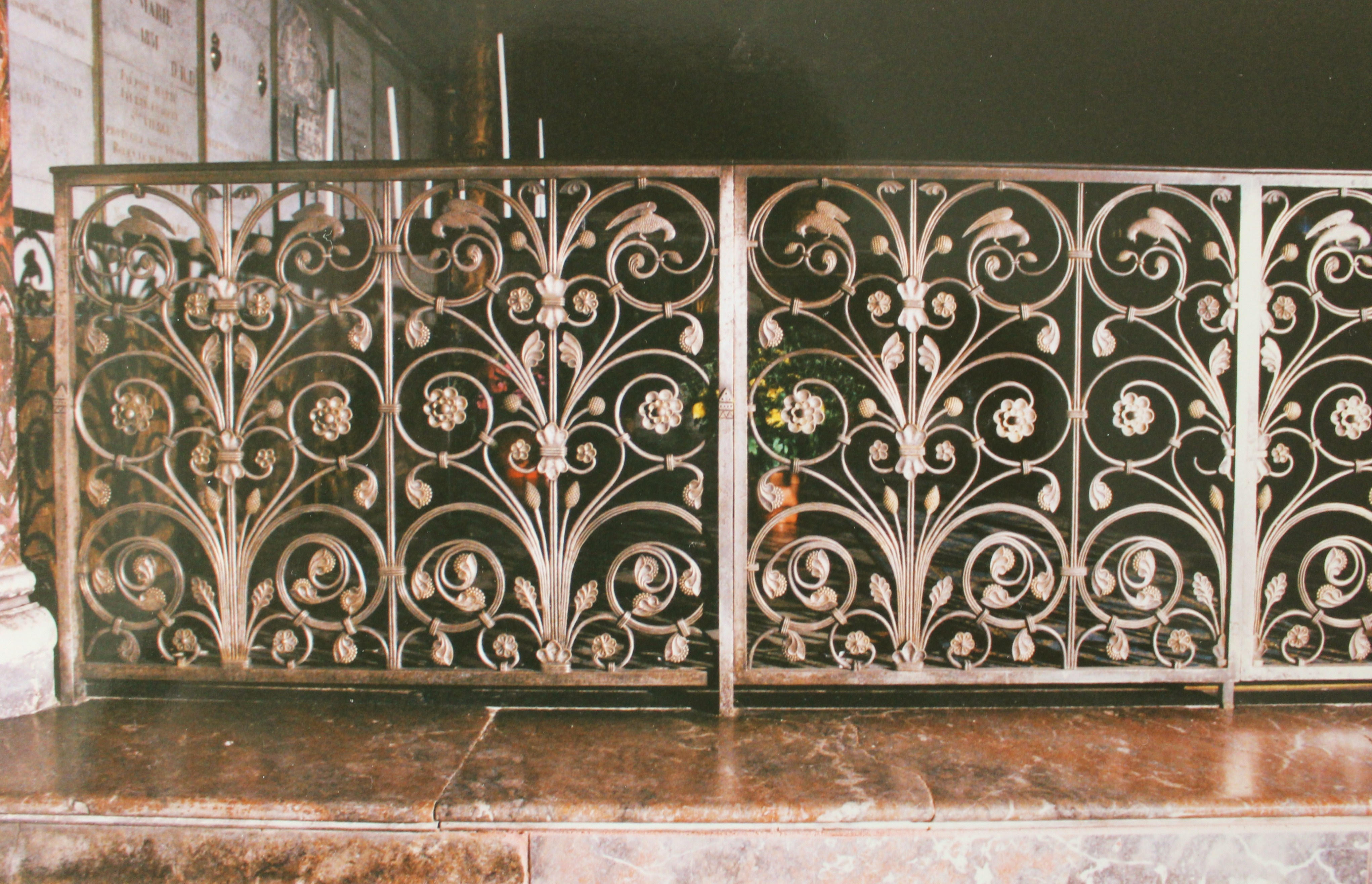 Grille de la chapelle de la Vierge dans la basilique Notre-Dame de Bonsecours (Seine-Maritime)